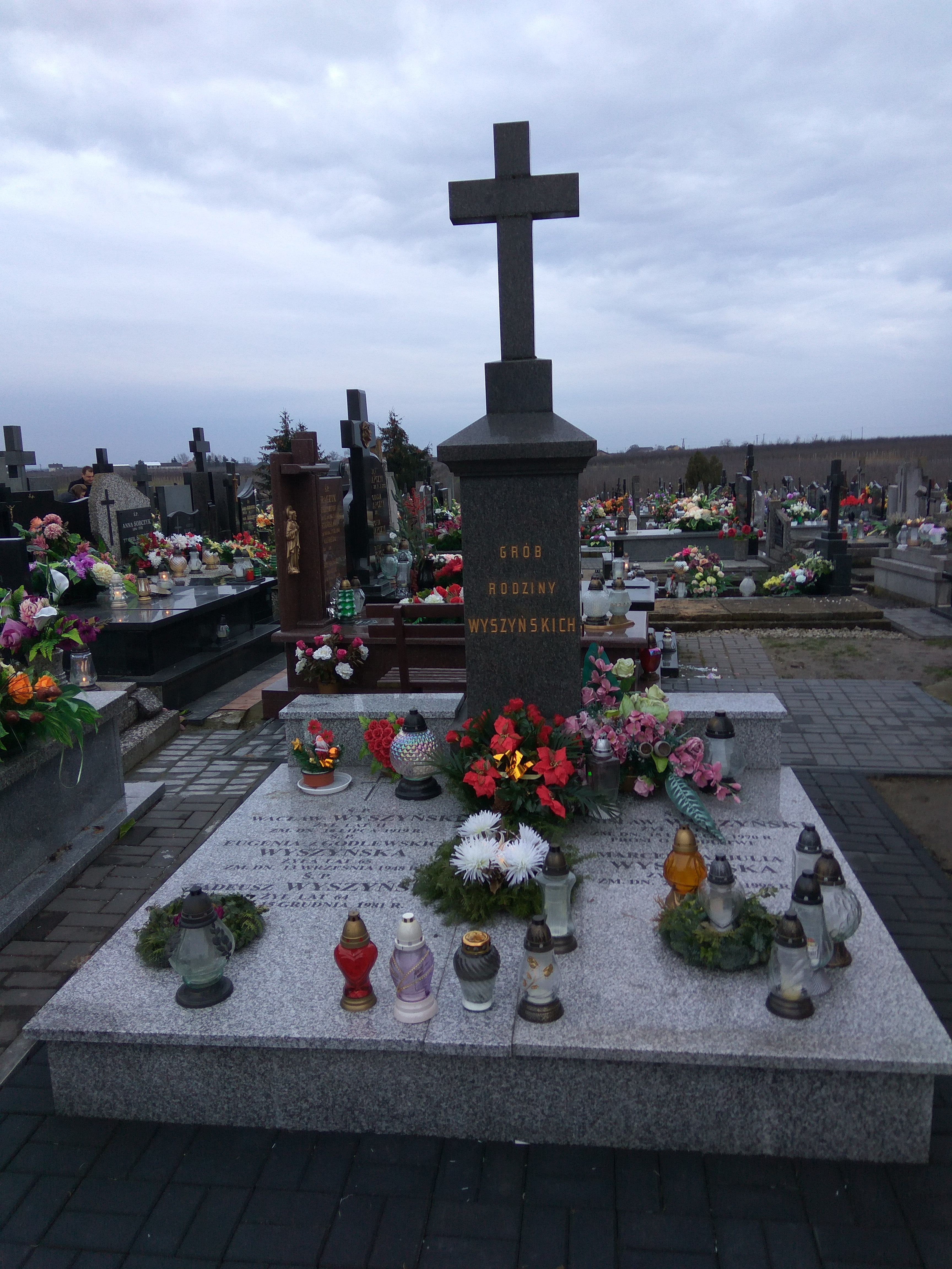 Grób rodziny Wyszyńskich na cmentarzu we Wrociszewie